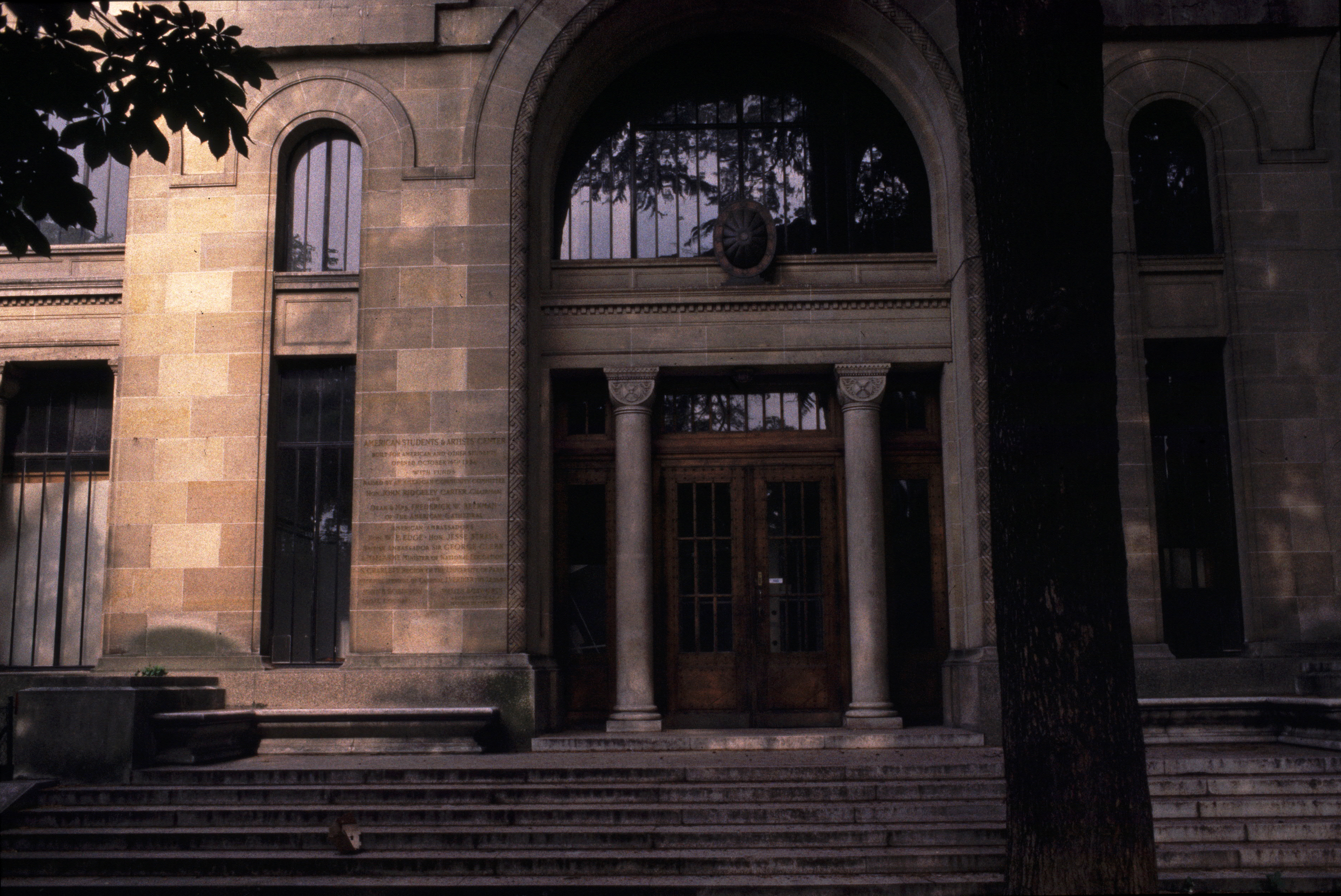 Le Centre Culturel Américain vers 1980 avant sa démolition. Lieu de rendez-vous de la jeunesse américaine à Paris. Dans les années 1960, s'y tenait le mardi les "Hootenanny" de Lionel Rocheman, programmant Alan Stivell, Steve Waring...